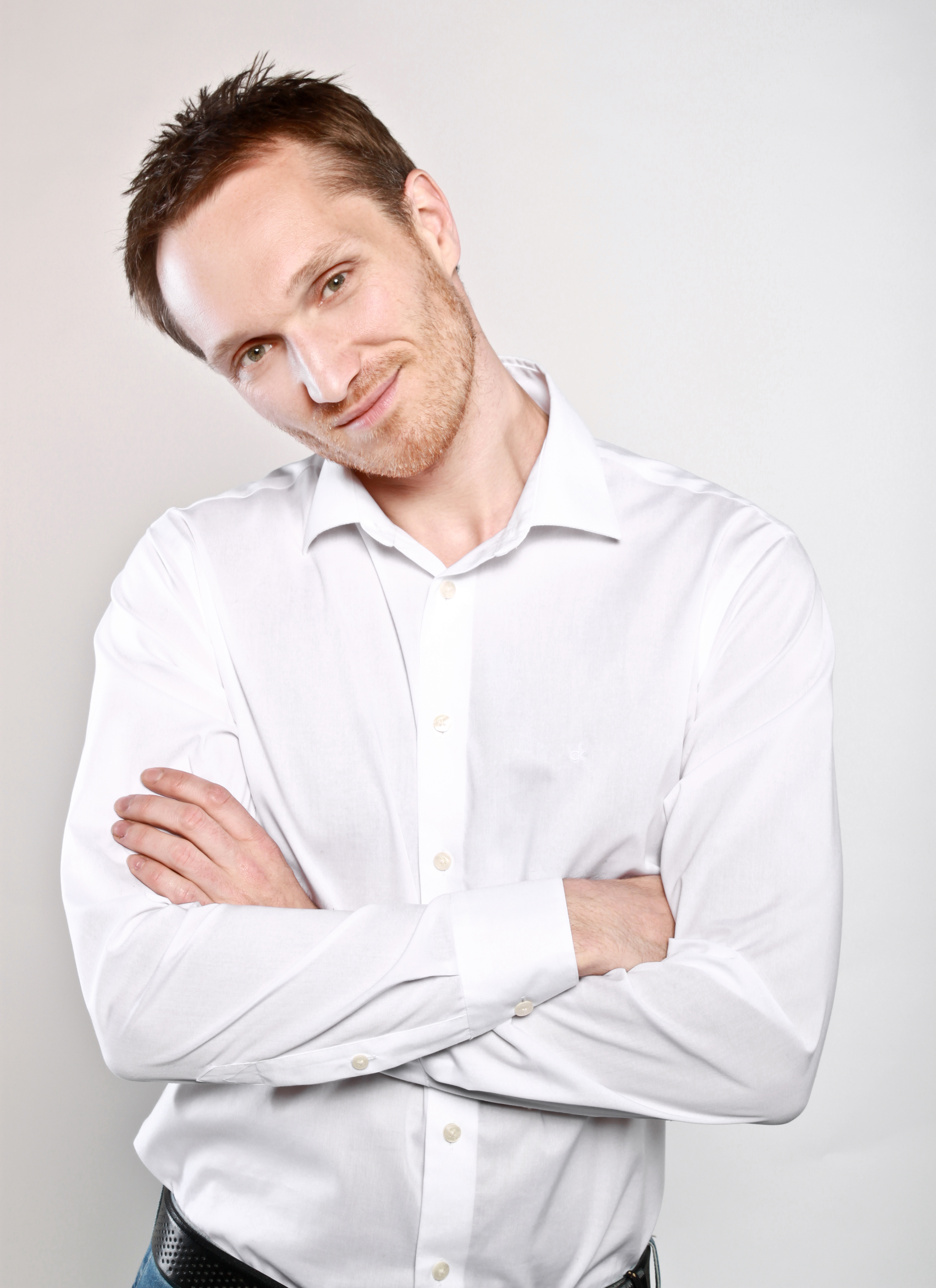 herec